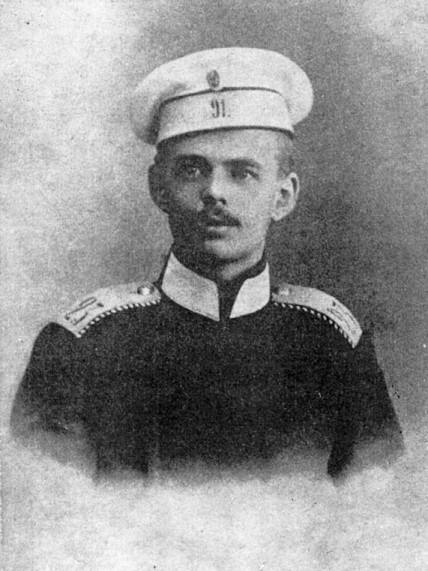 Р. Ф. Унгерн в форме вольноопределяющегося 91-го пехотного Двинского полка